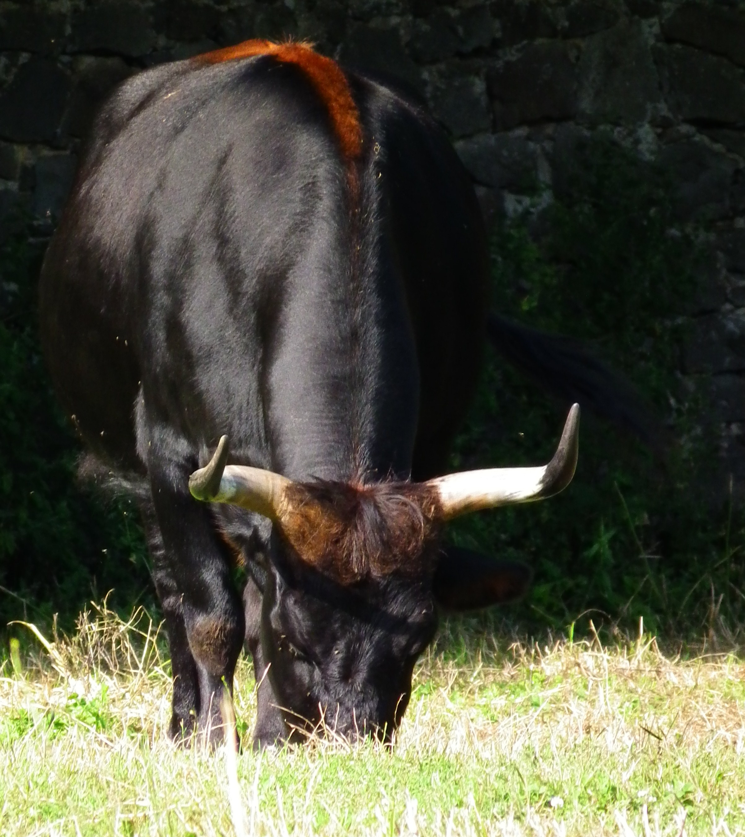 Auerochse (Bos primigenius), aufgenommen im Wildpark Alte Fasanerie in Klein-Auheim (Hessen, Deutschland)